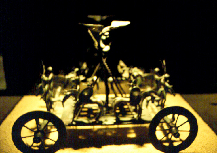 Der Strettweger Opferwagen ist ein um ca. 600 v. Chr. gefertigter bronzener Kultwagen, der 1851 beim Planieren eines Fürstengrabs der Hallstattkultur in Strettweg bei Judenburg in Österreich gefunden wurde. Neben dem Wagen wurden weitere Grabbeigaben, wie Schmuck und Amphoren aus Bronze, eiserne Waffen und Zaumzeug gefunden. Der Wagen besteht aus einer viereckigen, durchbrochenen Grundplatte mit vier Speichenrädern. Zentral auf dem Wagen steht eine etwa 32 cm hohe weibliche Gestalt, die mit erhobenen Händen einen schalenförmigen Gegenstand trägt. Neben ihr wird die Schale durch zwei scherenförmige Stützen gehalten. Auf der Schale ruht ein nahezu halbkugeliger Kessel, der von einem durchbrochenen Rand mit schneckenförmigen Verzierung abgeschlossen wird. Neben der Kesselträgerin stehen zahlreiche weitere Figuren in Form von stehenden und berittenen Menschen sowie pferde- und hirschähnlichen Tieren. Die dargestellte Szene wird als Opferszene interpretiert. Der Wagen diente vermutlich als Kultobjekt, zur Aufnahme von Trankopfern. Der Strettweger Opferwagen wurde 2009 restauriert und steht im Original im Universalmuseum Joanneum in Graz. Eine Kopie ist im Museum Judenburg ausgestellt. Im Universalmuseum Joanneum in Graz, Archäologiemuseum Schloss Eggenberg fotografiert.